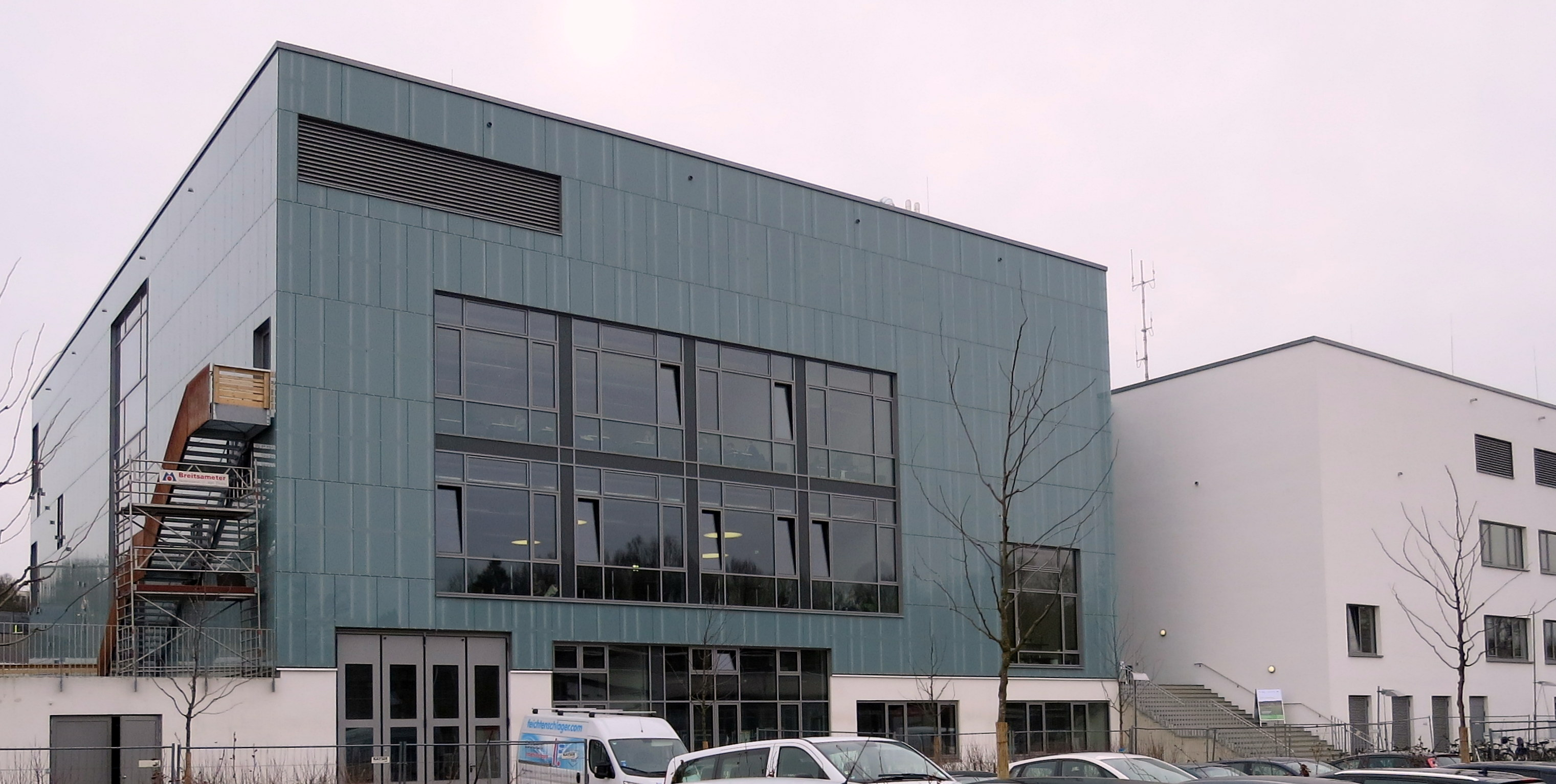 Kurz vor der Fertigstellung